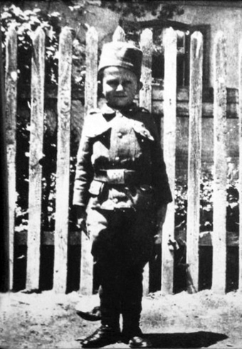 Момчило Гаврић, најмлађи каплар на српске војске у Првом светском рату. Слика се налази у Српској кући на Крфу. Испод слике, стоји натпис: "Једанаестогодишњи артиљеријски поднаредник, најмлађи подофицир свих армија света у првом светском рату. Крф, 1916."